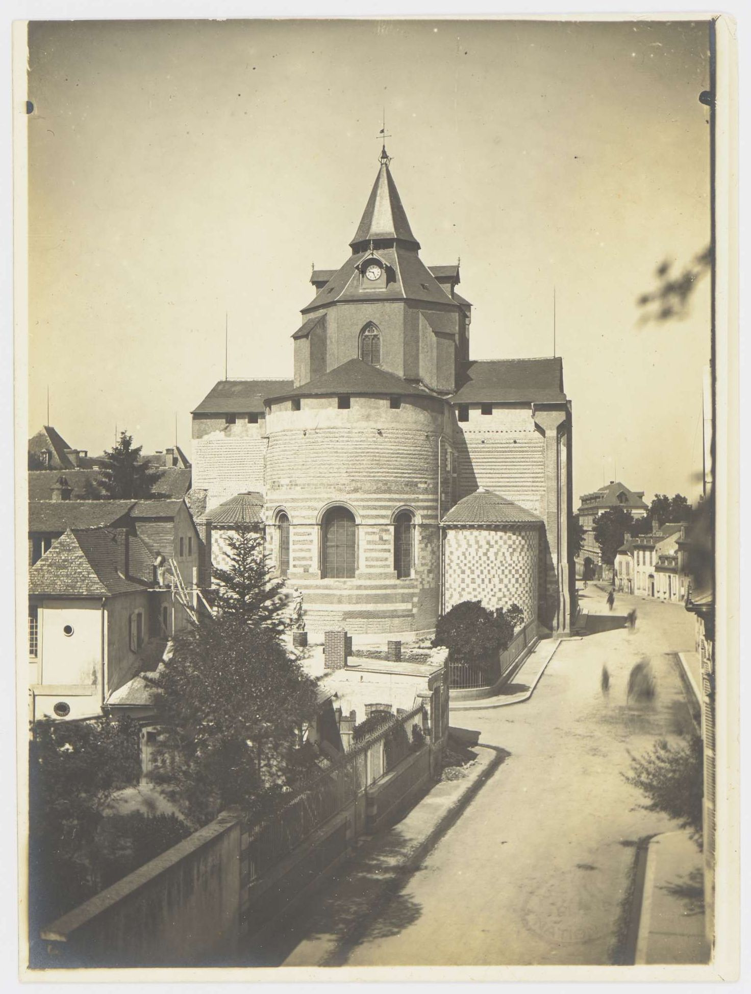 Cathédrale de Tarbes, en cours de restauration : vue du chevet. 1 plan, 1 élévation, 1 coupe, signé, approbation de l'évêque et du préfet. Échelle : 5 cm / 1 m. Photographie issue des dossiers de travaux de restauration des cathédrales (1802-1912), conservés aux Archives nationales (inventaire et documents numérisés consultables en ligne).